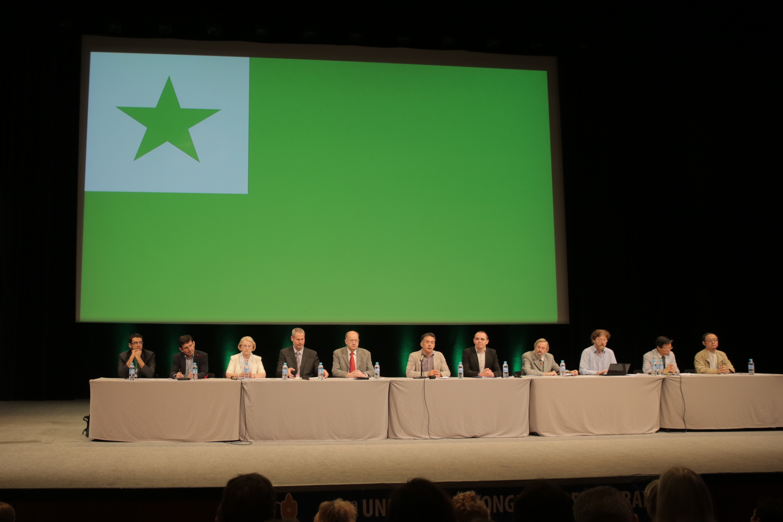 La estraro de UEA dum la solena fermo de la 100-a Universala Kongreso de Esperanto, Lillo (Francio), 2015